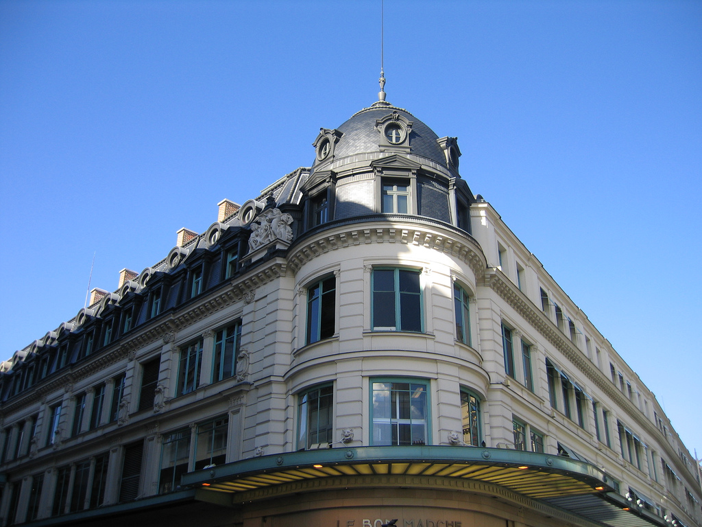 Le Bon Marché, dans le VIIè arrondissement de Paris.